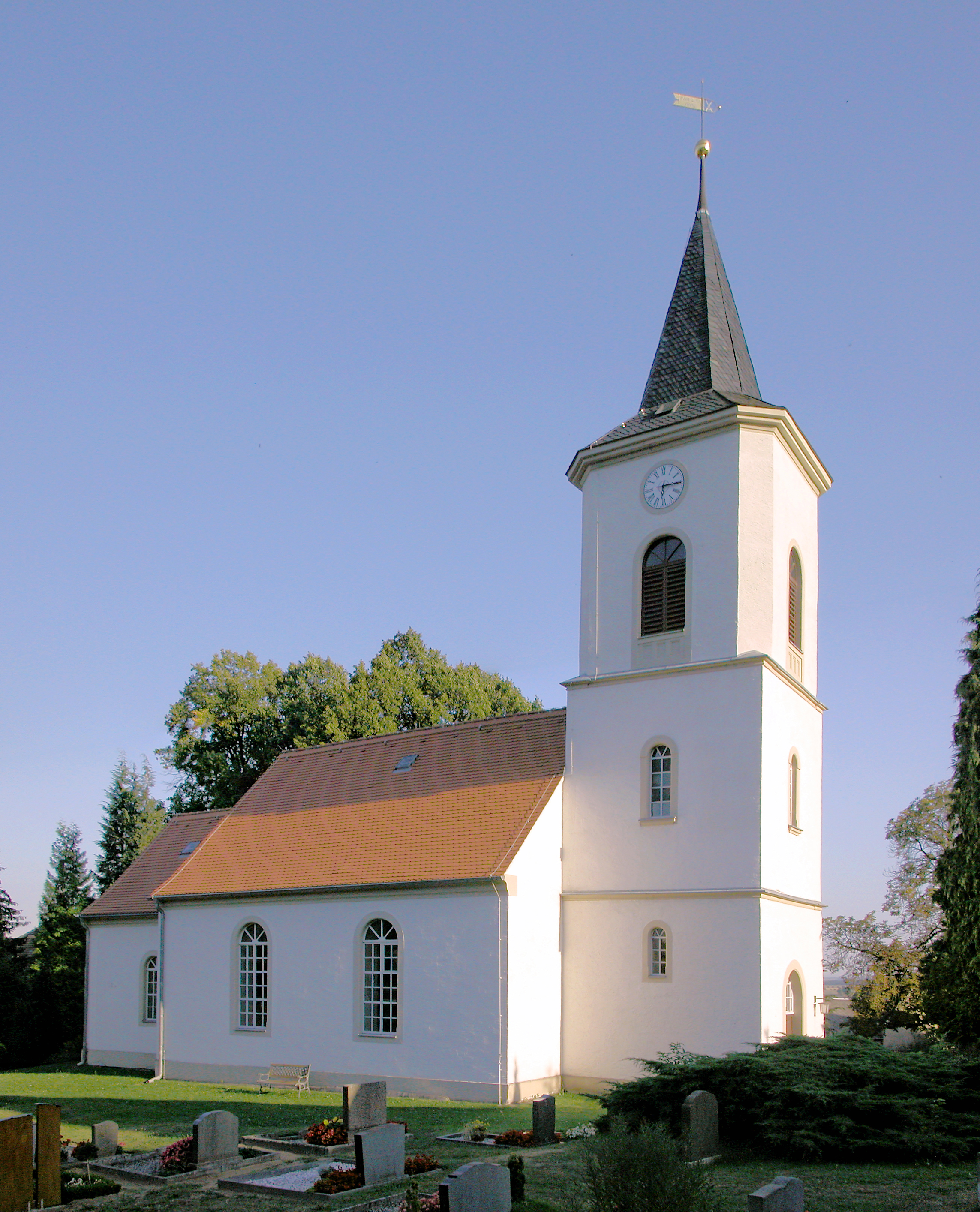 01.09.2009 04779 Collm (Wermsdorf), Kirchberg: Die Dorfkirche (GMP: 51.302924,13.018463) steht neben einer mehr als tausend Jahre alten einstigen Gerichts-Linde. Die romanische Saalkirche, bestehend aus Langhaus, Chor und halbkreisförmig überwölbter Apsis, stammt wahrscheinlich aus der zweiten Hälfte des 12. Jahrhunderts. Einen Westturm hatte die Kirche früher nicht, dafür einen Dachreiter. Erst 1864 wurde ein Turm nach Plänen des Leipziger Baumeisters Ernst Zocher ergänzt. [DSCN38827-38828.TIF]20090901580MDR.JPG(c)Blobelt